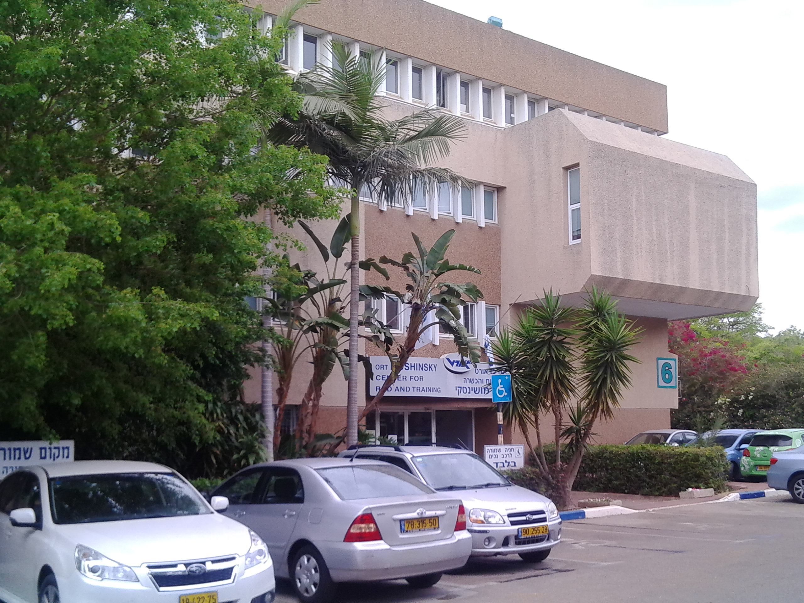 מרכז מו"פ אורט ע"ש מושינסקי, 2015